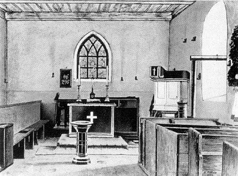 Berlin, Dorfkirche Schmargendorf